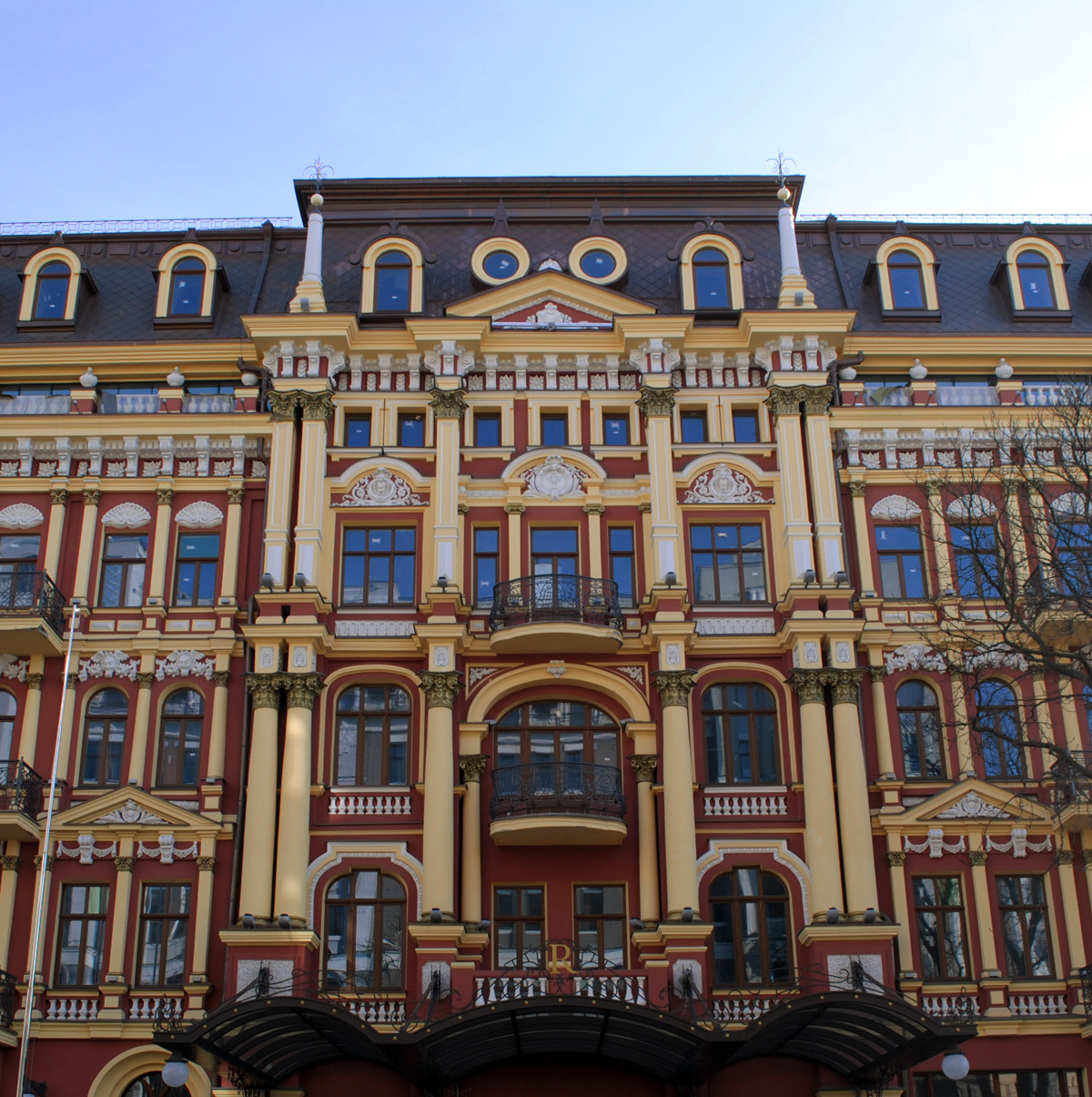 Будинок прибутковий, Київ, Володимирська вул., 39/24